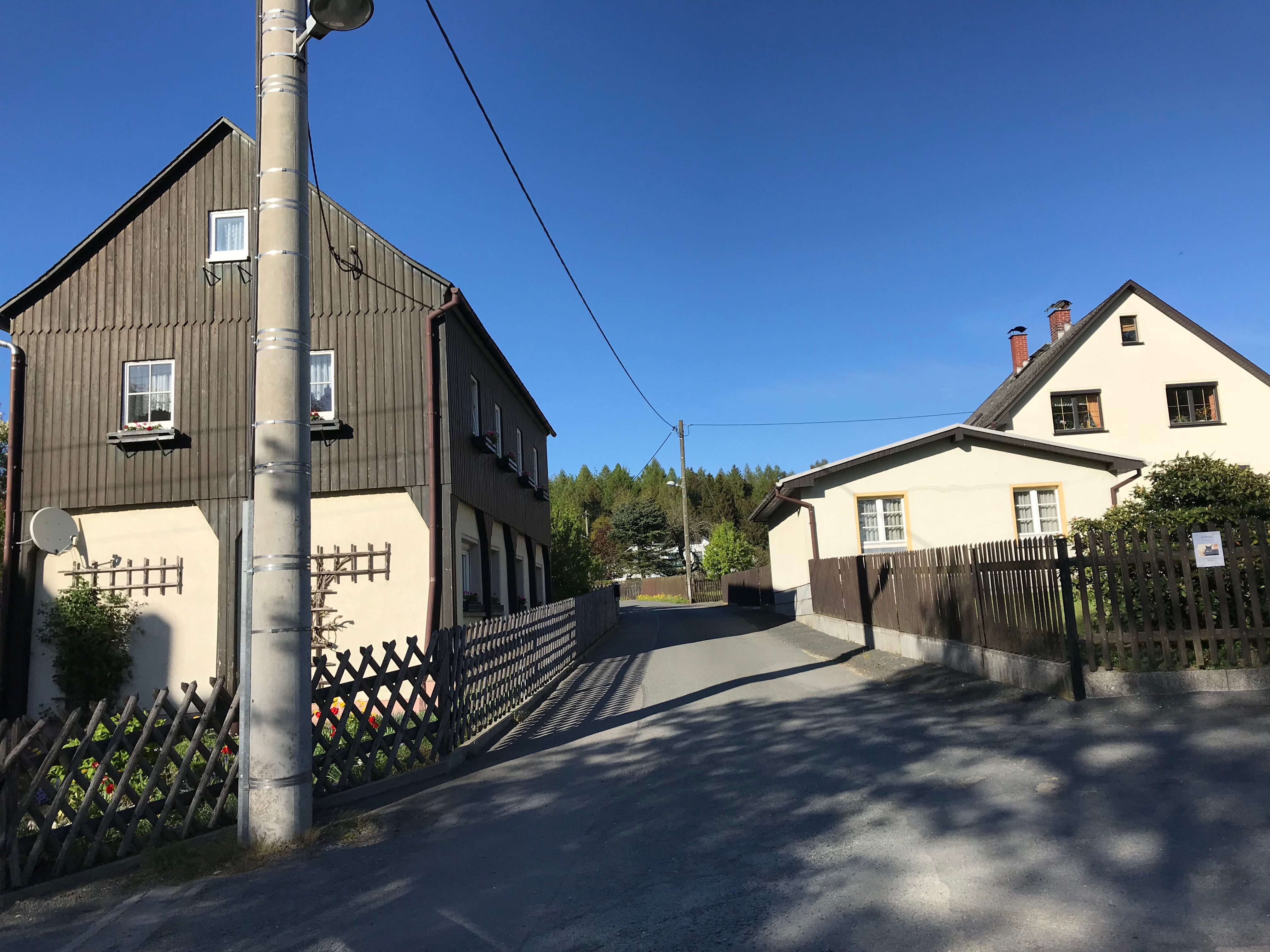 Ansicht Ortsteil Buch (2018)